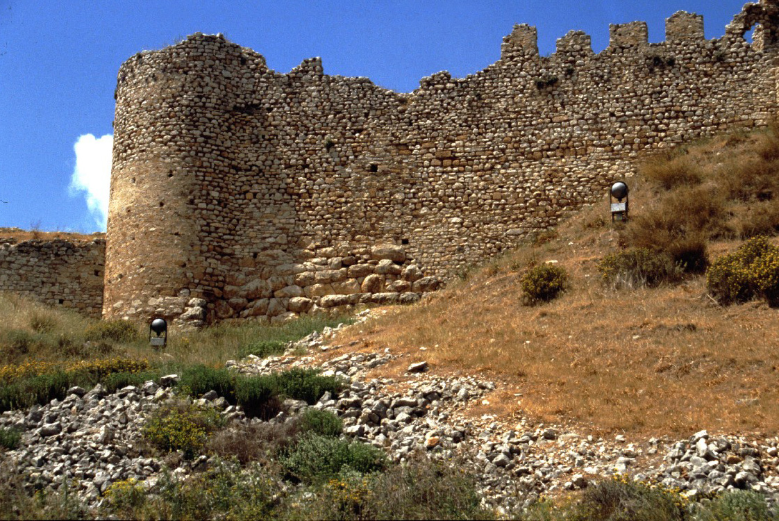 Die Burg Larissa bei Argos